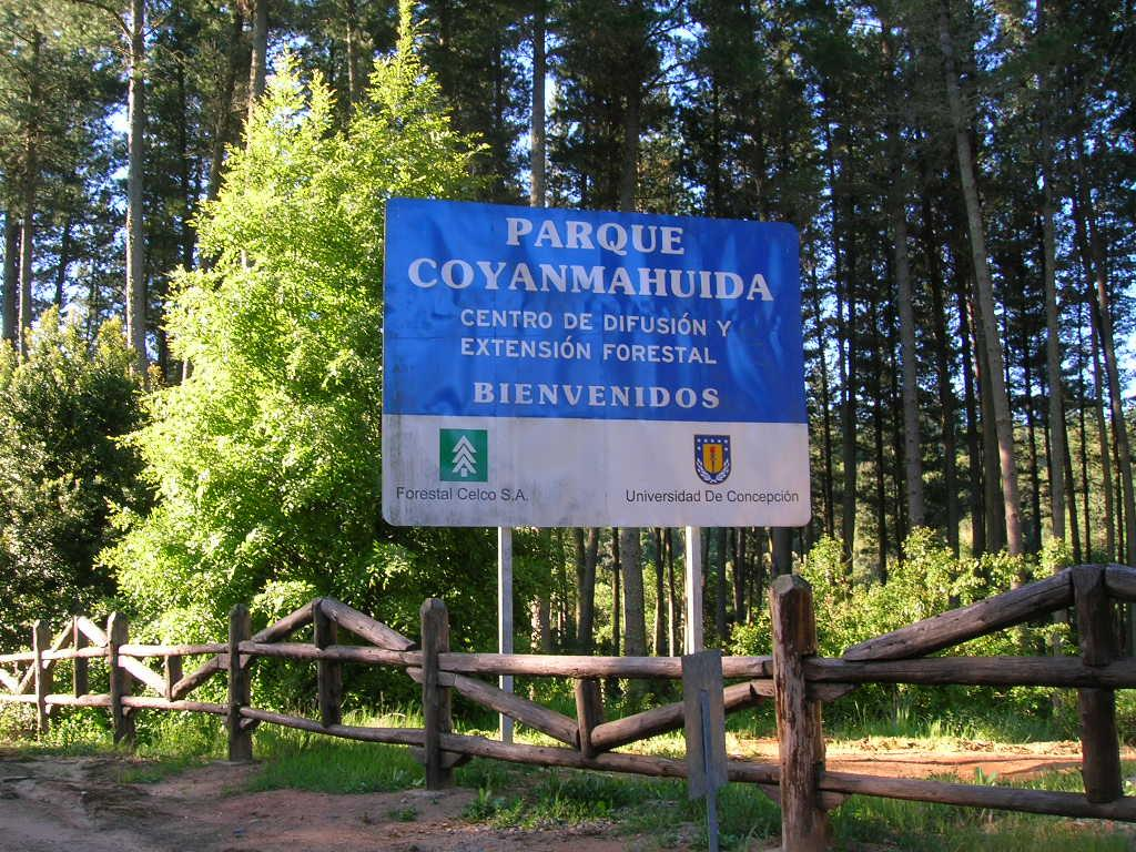 Cartel Entrada Parque Coyanmahuida